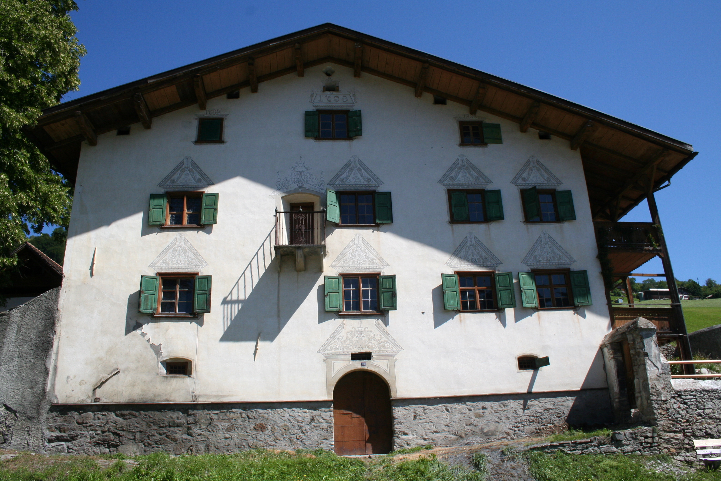 Haus in Luzein GR